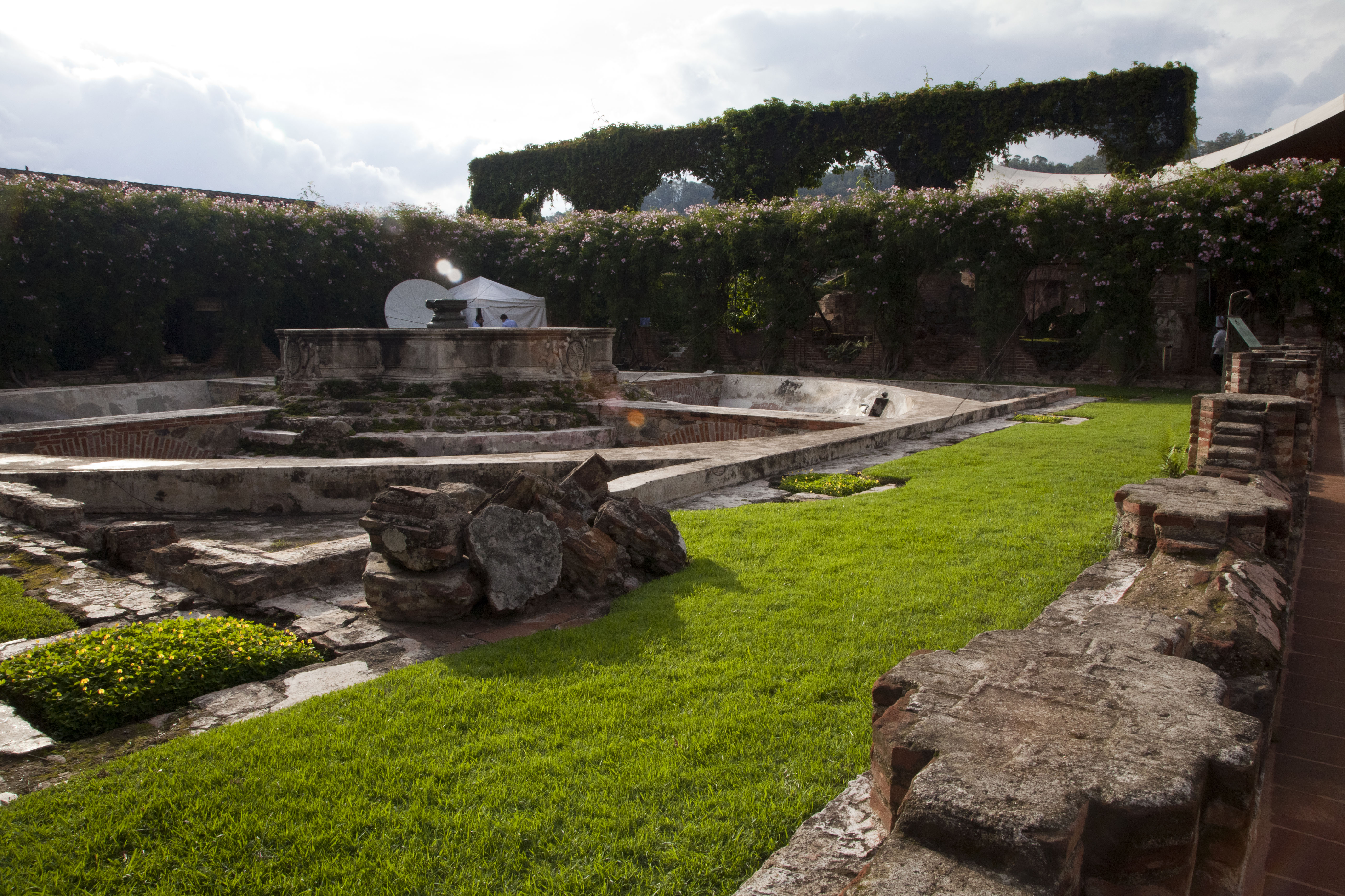 Antigua (Guatemala), 5 de junio 2013. Exteriores del Hotel Casa Santo Domingo, lugar donde se desarrolla la 43 Asamblea General de la OEA. Foto: Fernanda LeMarie - Cancillería del Ecuador.